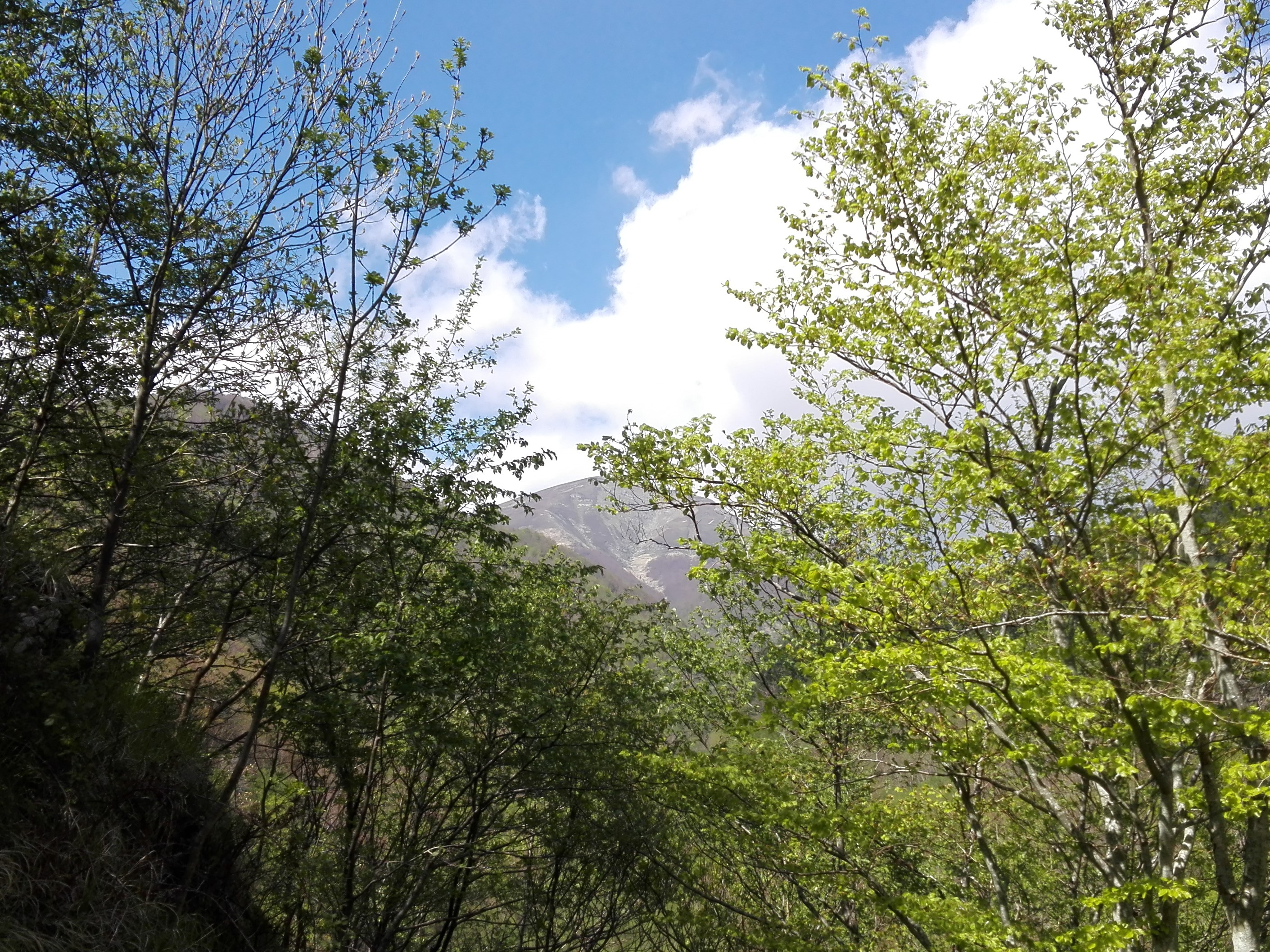 Veduta della Cima nella Valle della Verdiana